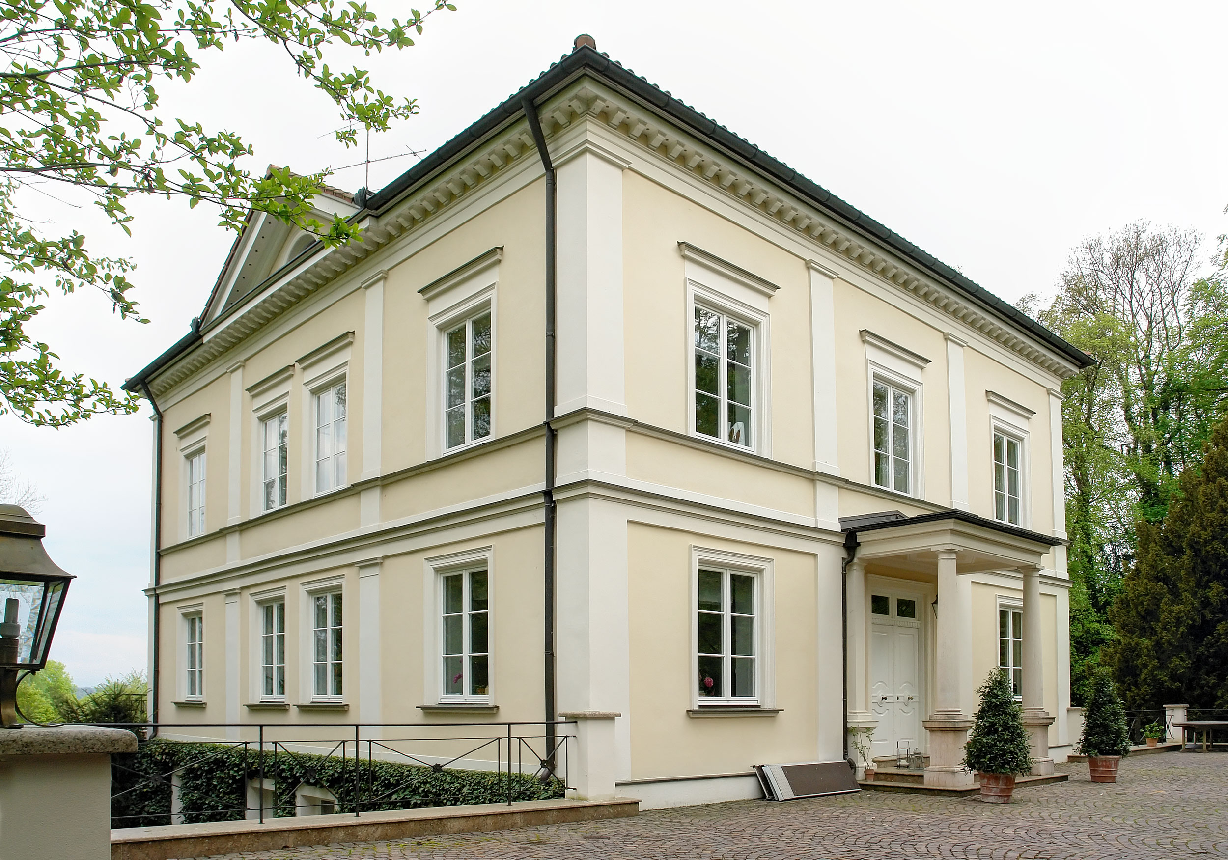 Feldafing: Villa Siedhoff (Villa Rosa), Seestraße 16. 1870 von Johann Biersack für sich selbst, dann für die Münchner Geldleiherin Adele Spitzeder erbaut (Veranda an der Ostseite 1935 von Xaver Knittl); mit Parkanlage, 19. Jh This is the photograph of an architectural monument. It is part of the list of cultural monuments of Bayern, no. D-1-88-118-34